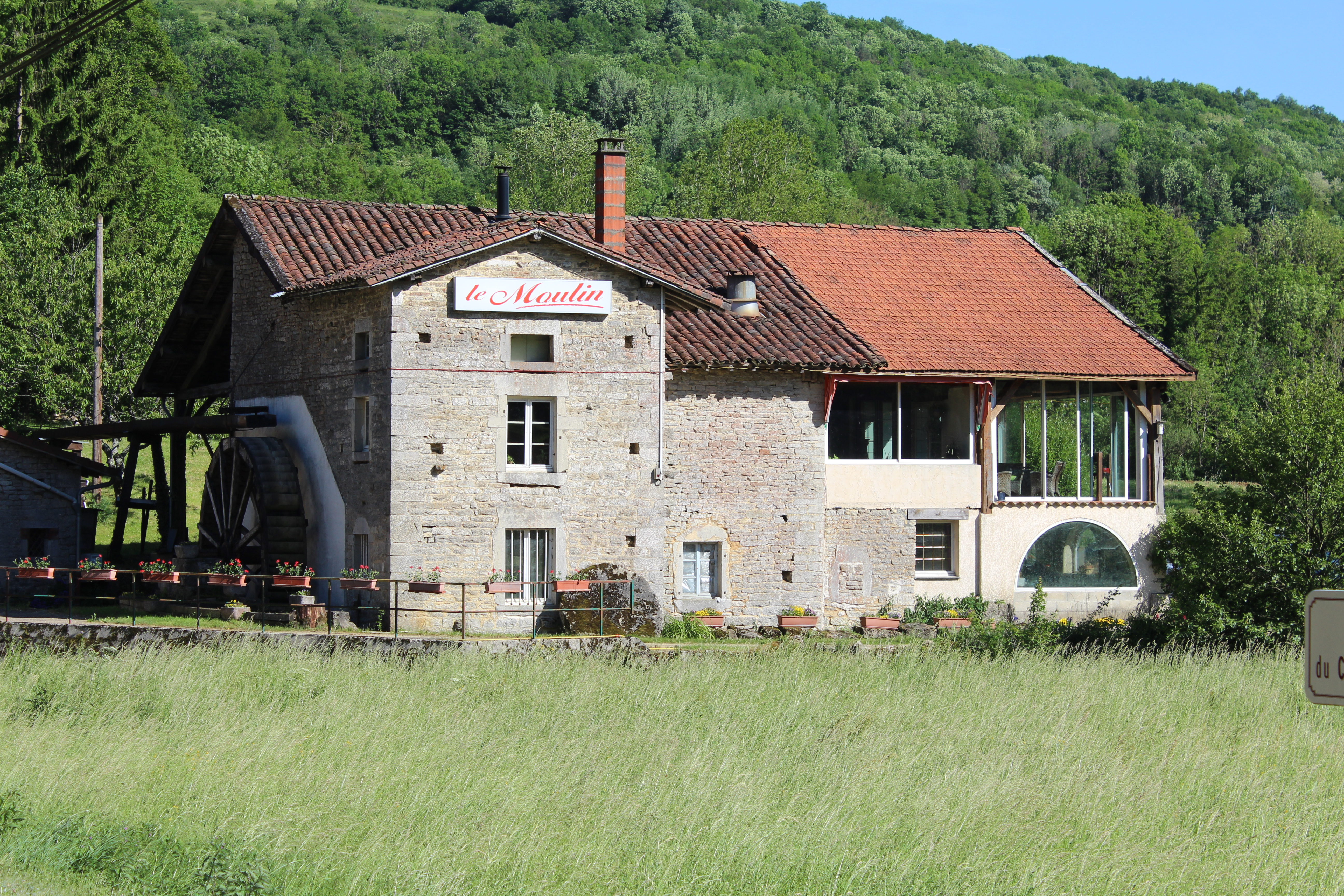 Moulin de Germagnat, Nivigne-et-Suran.